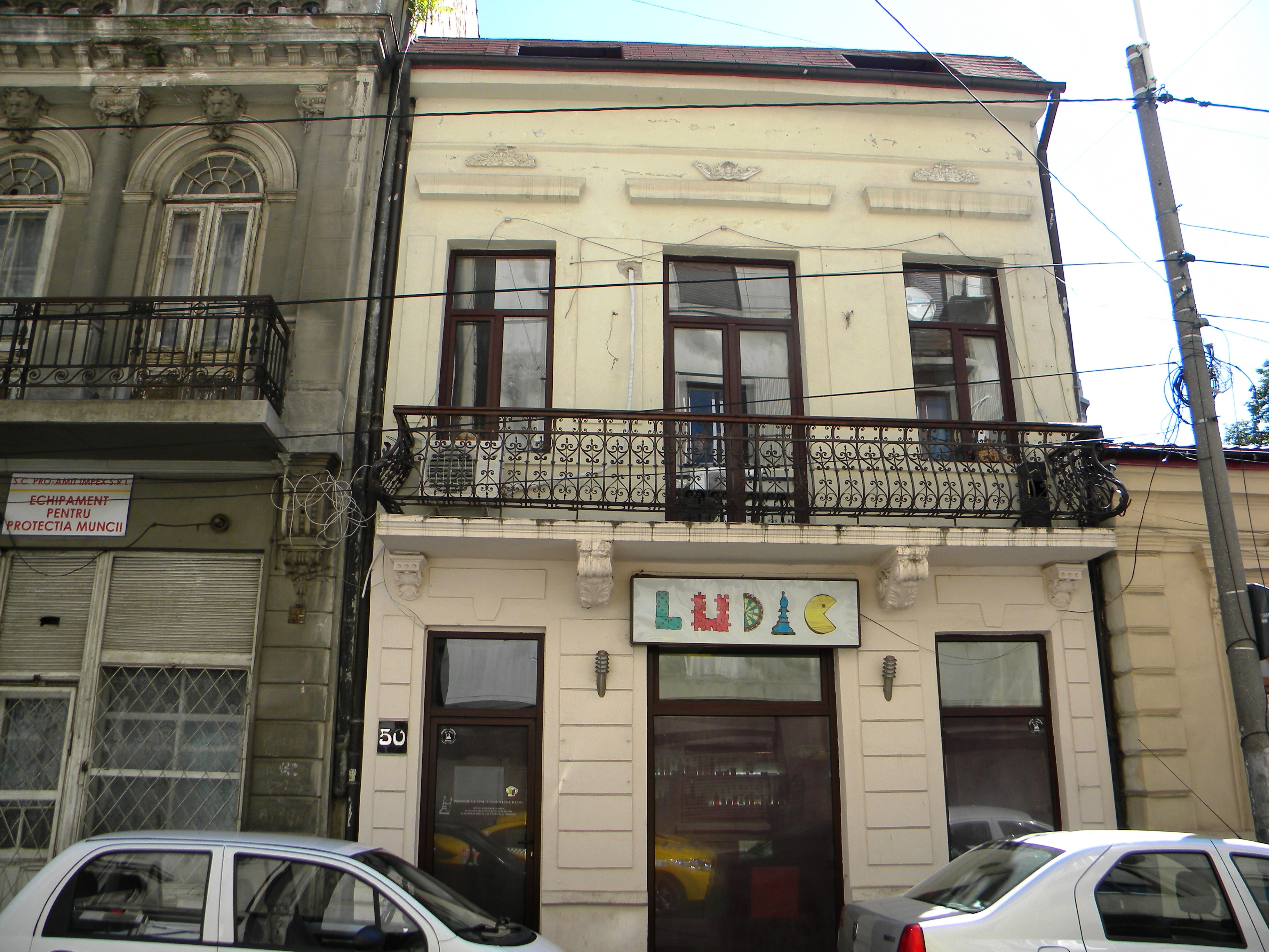 Bucuresti, Romania, Casa pe Str. Coltei nr. 50, sector 3